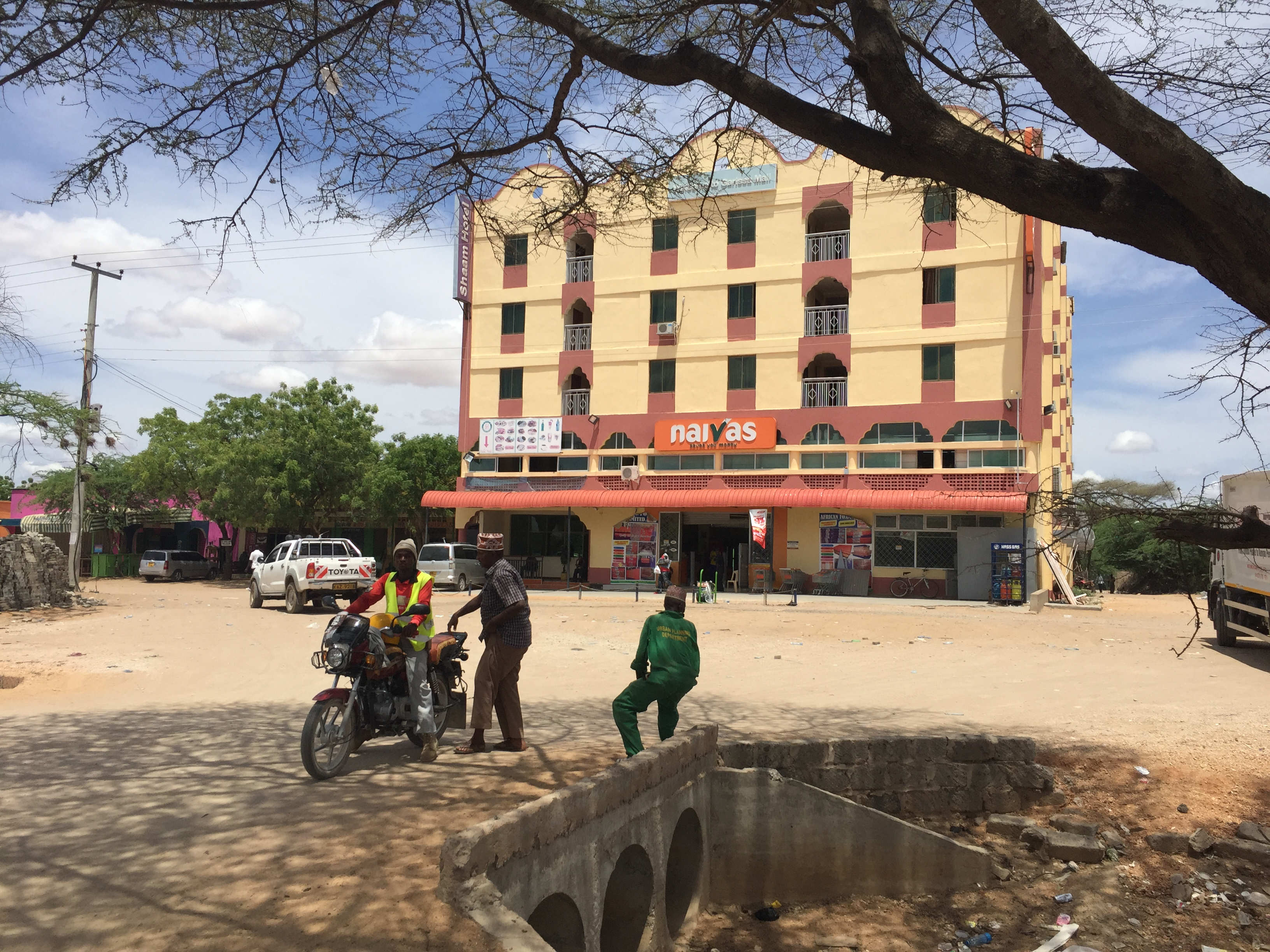 Garissa, Kenya